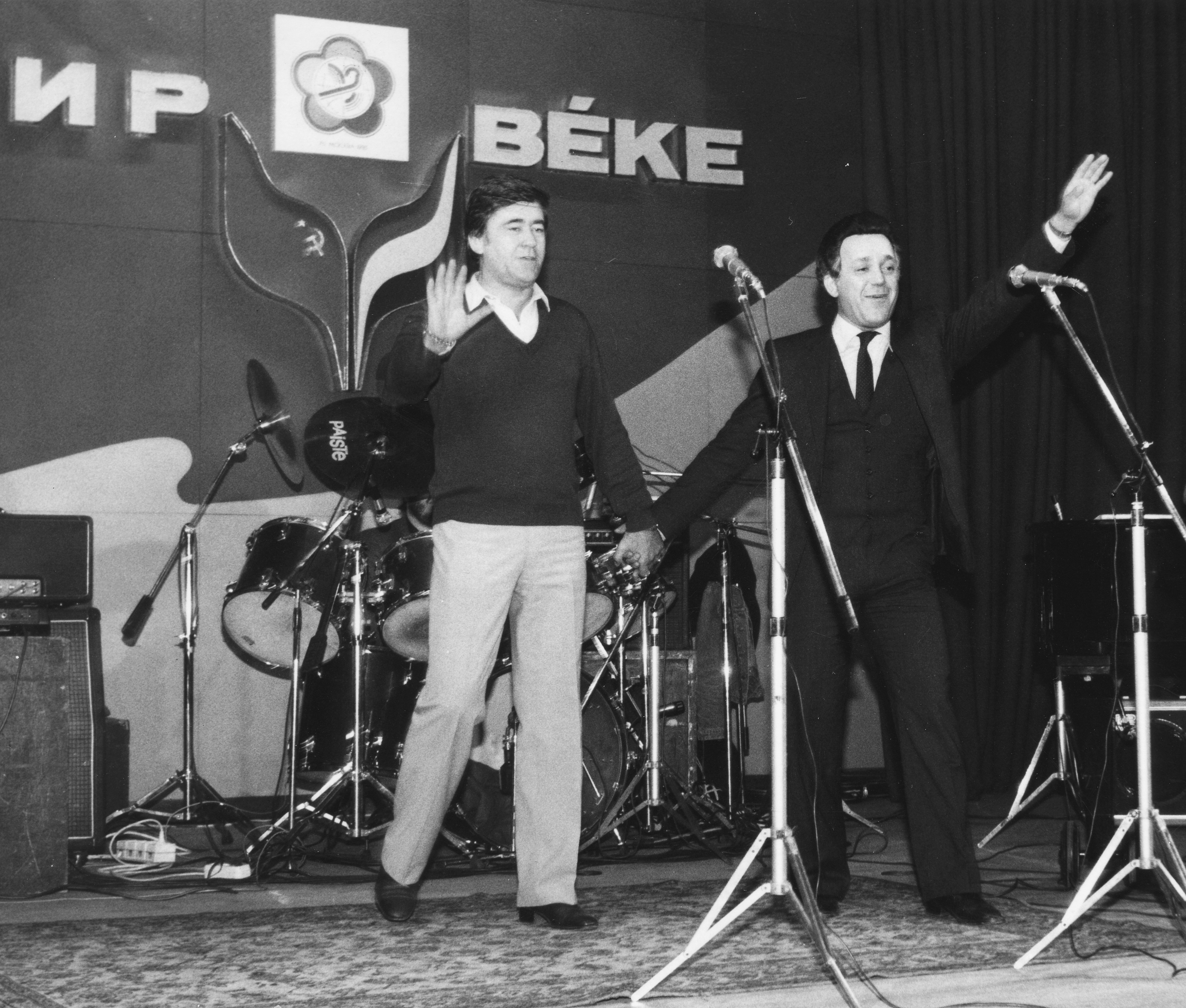 Rádió kabarészínháza a Szovjet Tudomány és Kultúra Házából. Koós János és Joszif Kobzon, a házigazda. Location: Hungary, Budapest V. Tags: Budapest Title: Rádió kabarészínháza a Szovjet Tudomány és Kultúra Házából. Koós János és Joszif Kobzon, a házigazda.